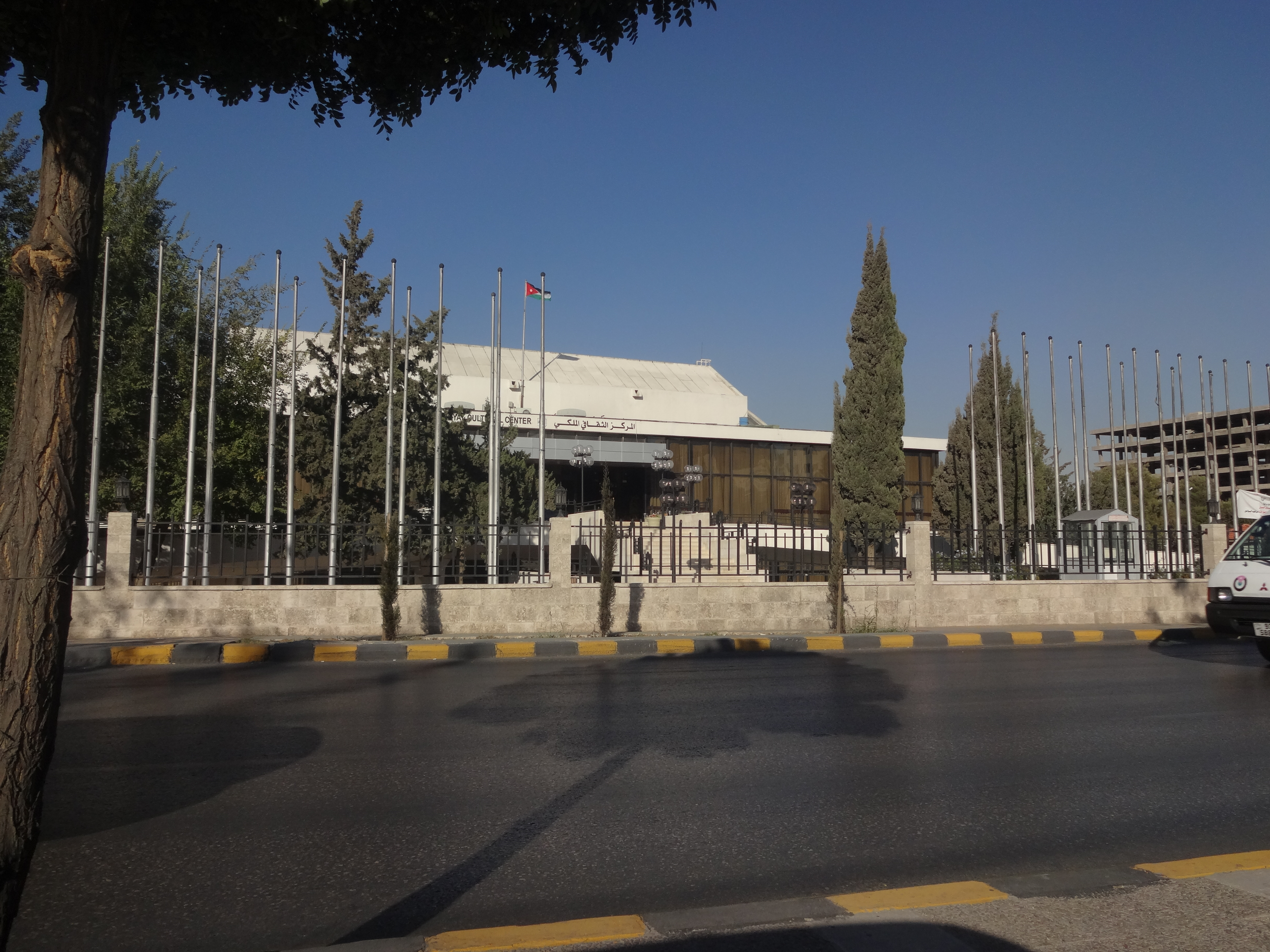 Royal cultural Center 1, Amman, Jordan